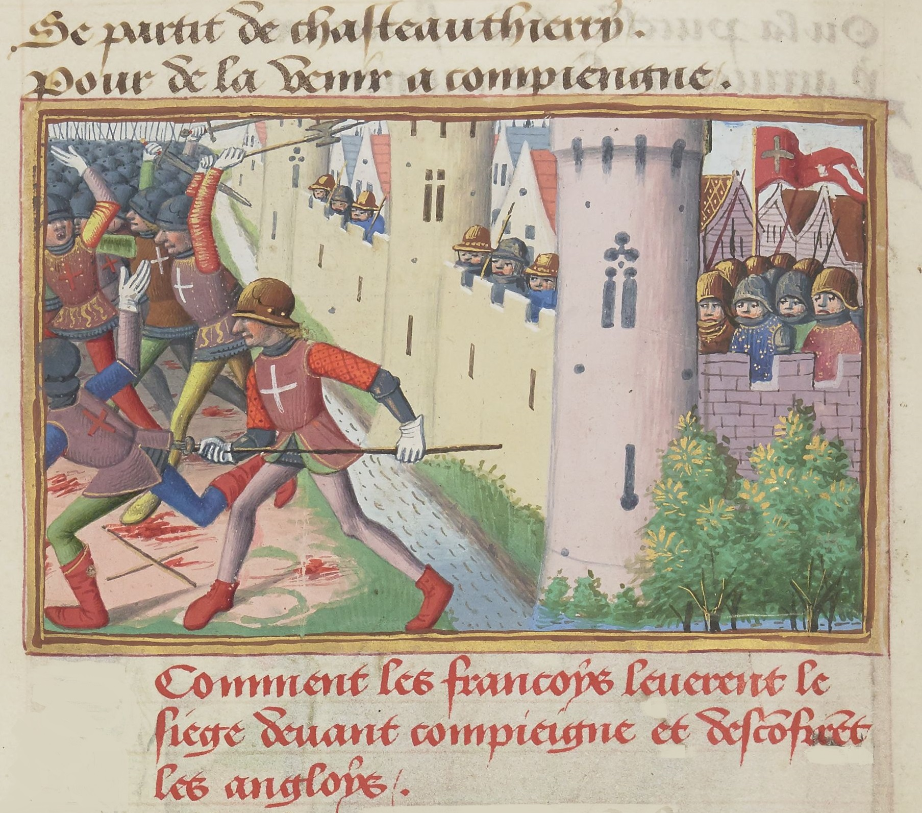 Les Français lèvent le siège de Compiègne en 1430.